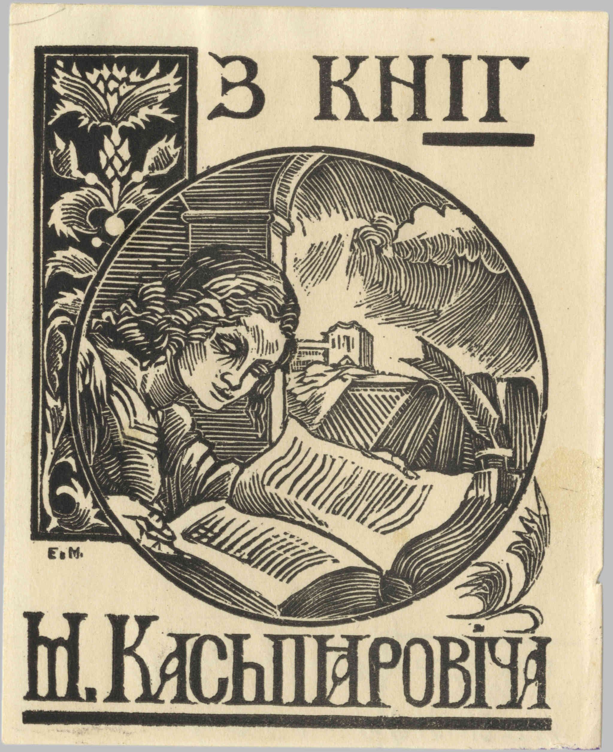 Экслібрыс М. Каспяровіча (1925) мастака Я. Мініна. Папера, ксілаграфія. А. 8,8×7 см; В. 8×6,2 см. Нацыянальны мастацкі музей Рэспублікі Беларусь